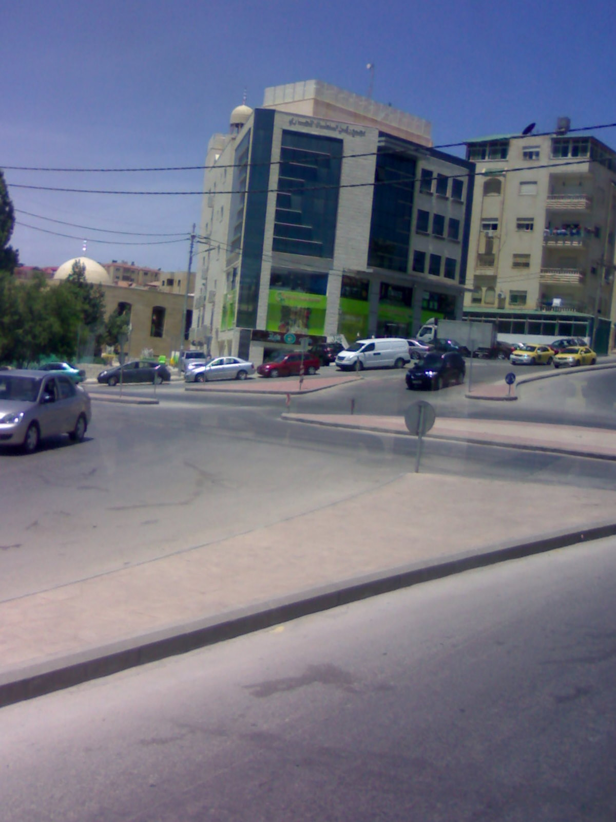 تلاع العلي، عمان، الأردن